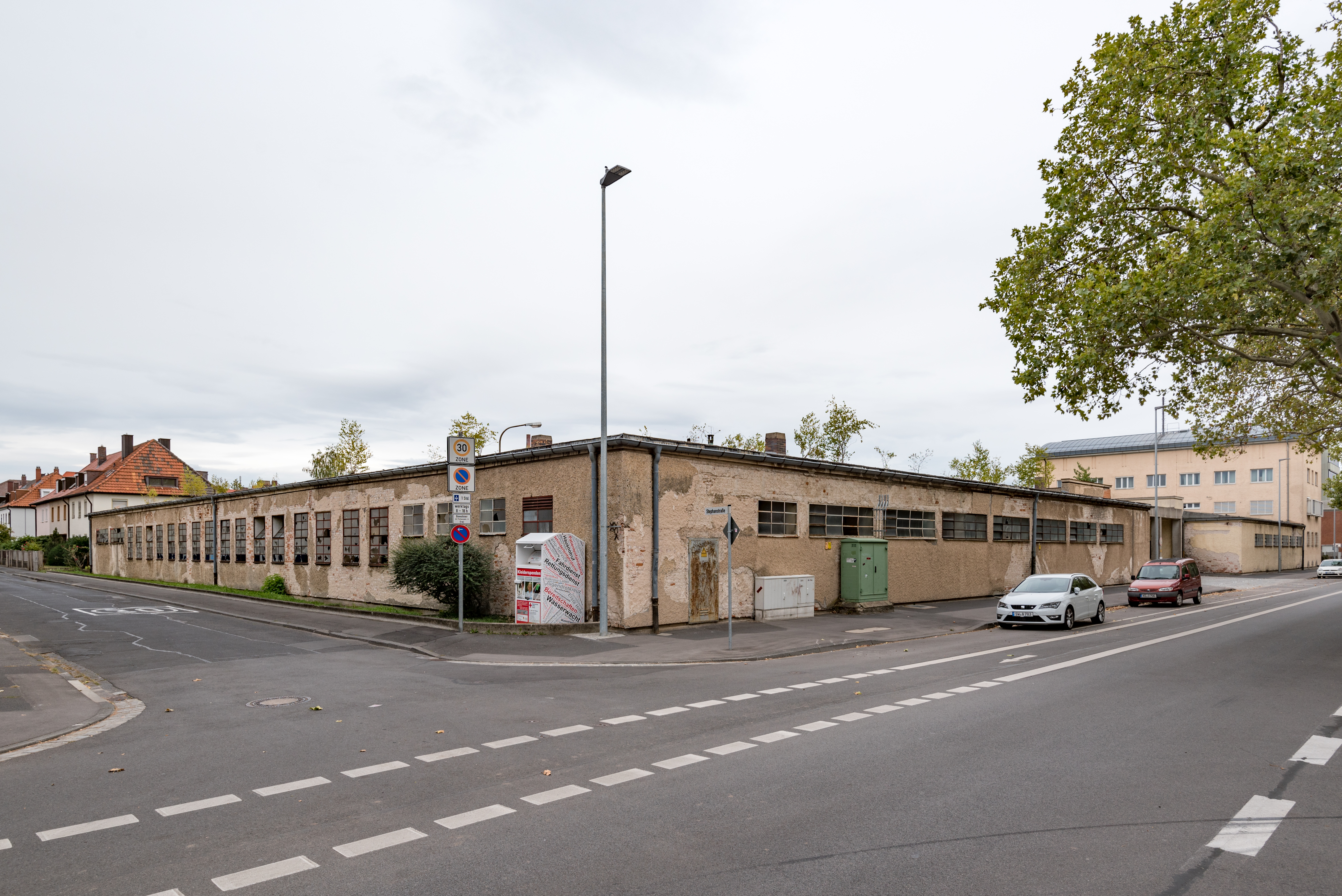 Stresemannstraße 16 SchweinfurtThis is a photograph of an architectural monument.